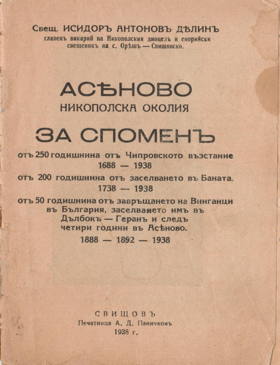 свещ. Исидор Делин – Асеново за спомен – 1938 г.